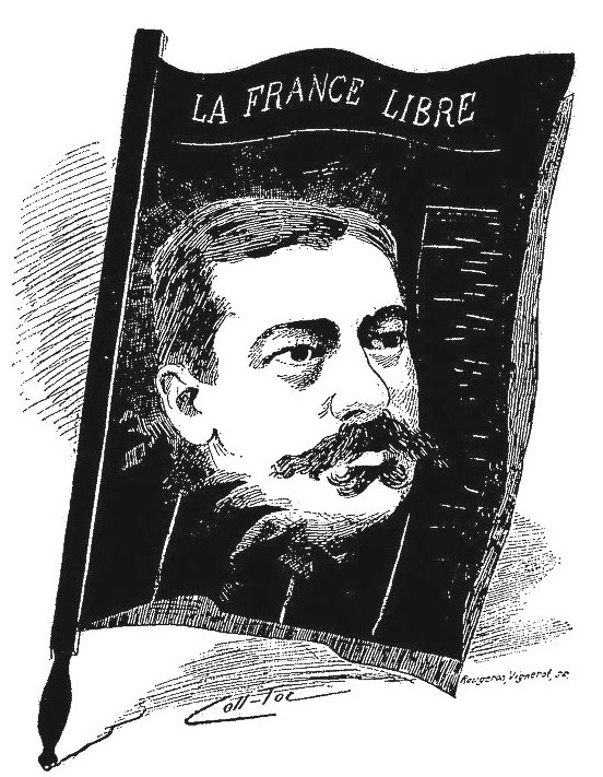 "Silhouettes parisiennes - A. Maujan (d'après la photographie Carjat)."